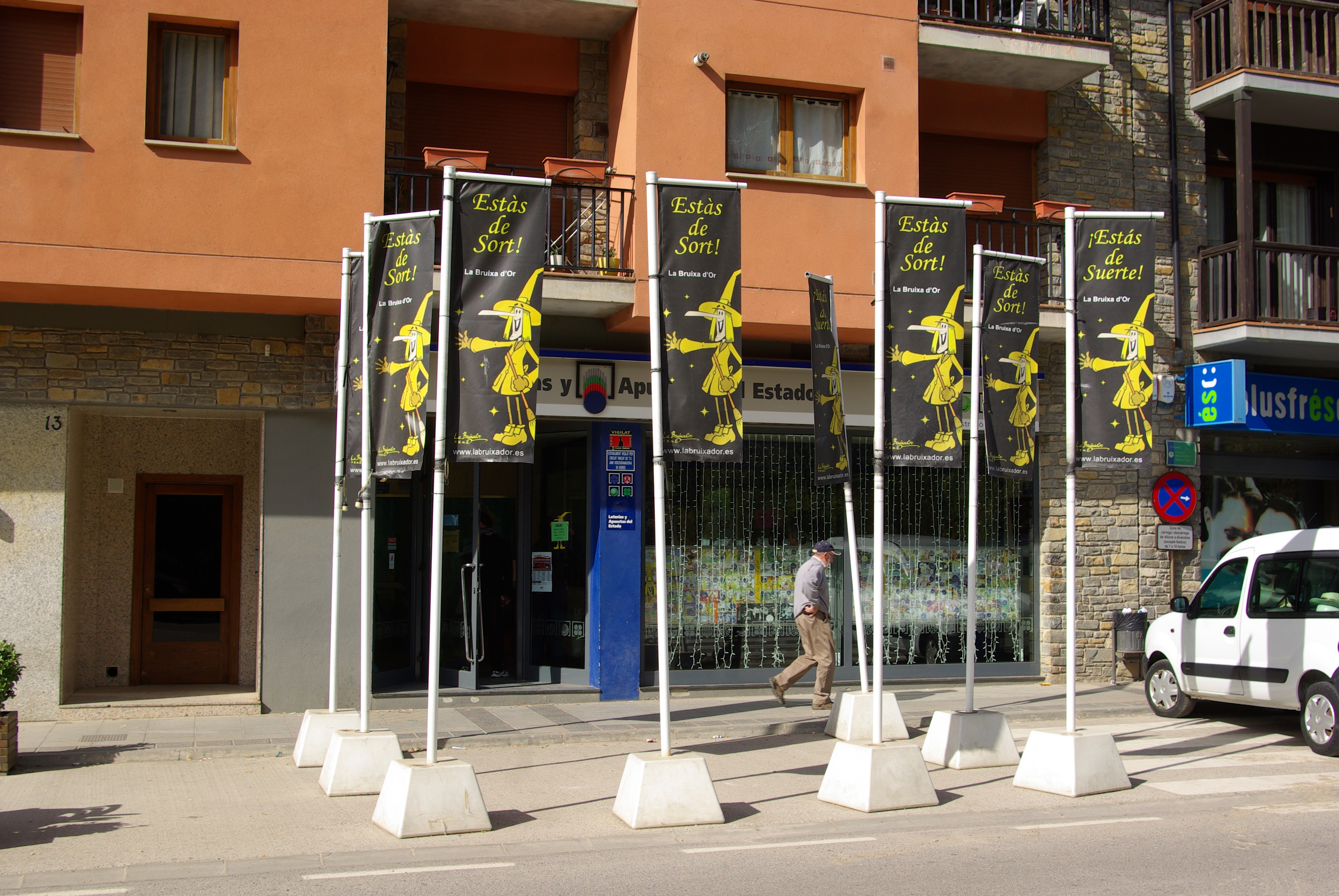 Administración de Loterías La Bruja de Oro en Sort